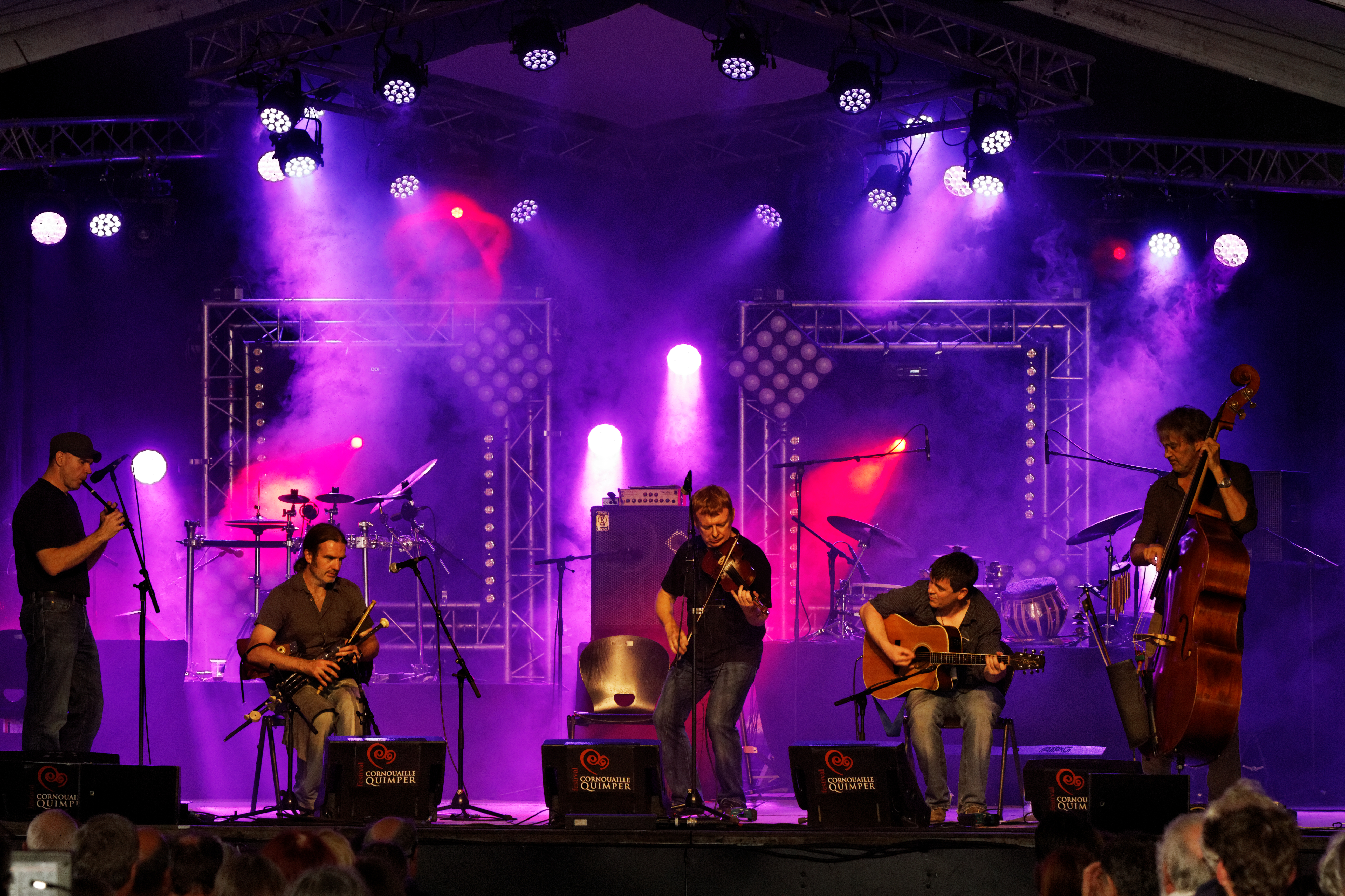 Lúnasa en concert à l'espace évêché lors du festival de Cornouaille 2013.